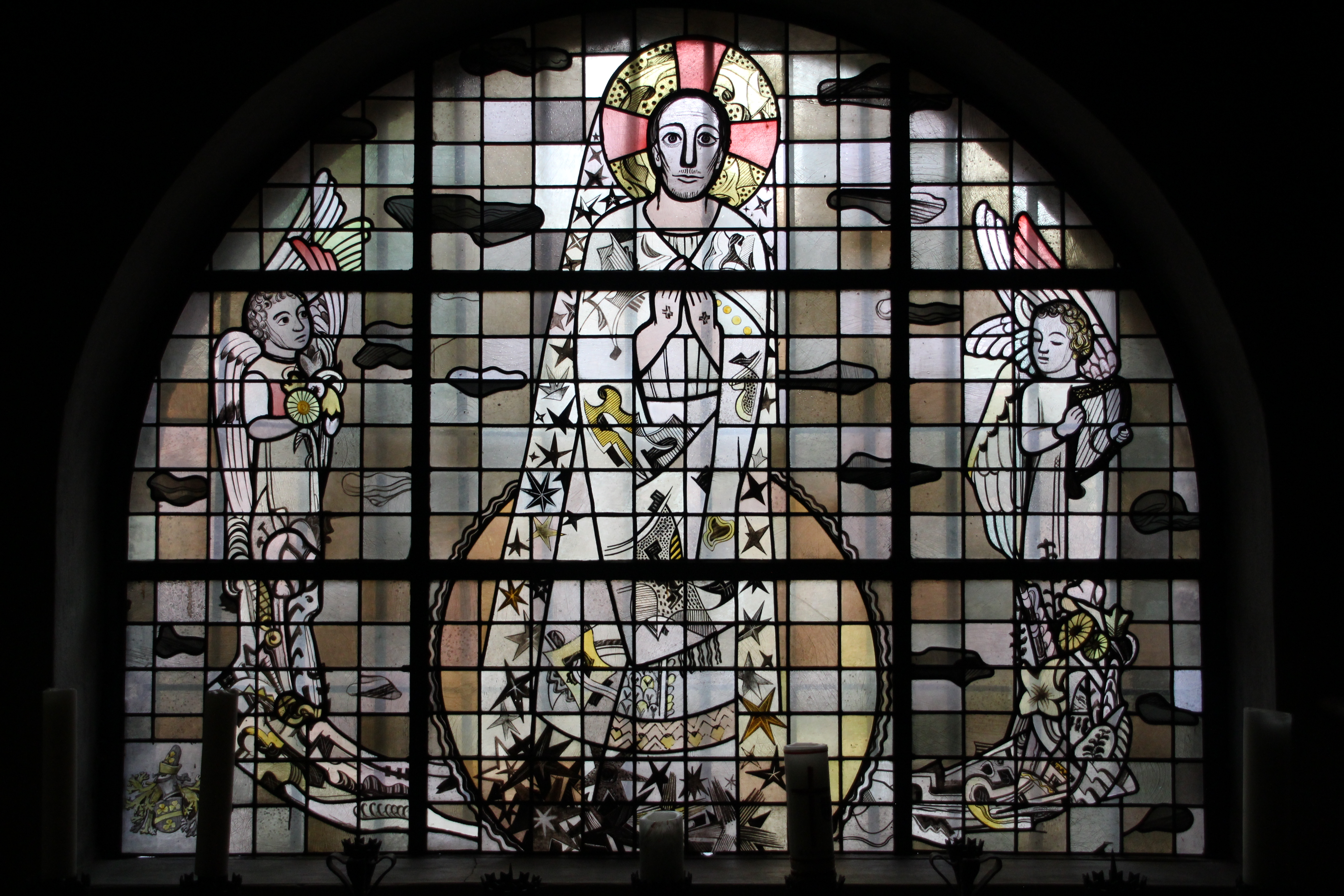 Fenster "Der Auferstandene Christus" von Peter Hecker (1952) in der Gedächtniskapelle in Klein St. Arnold in Arnoldsweiler.